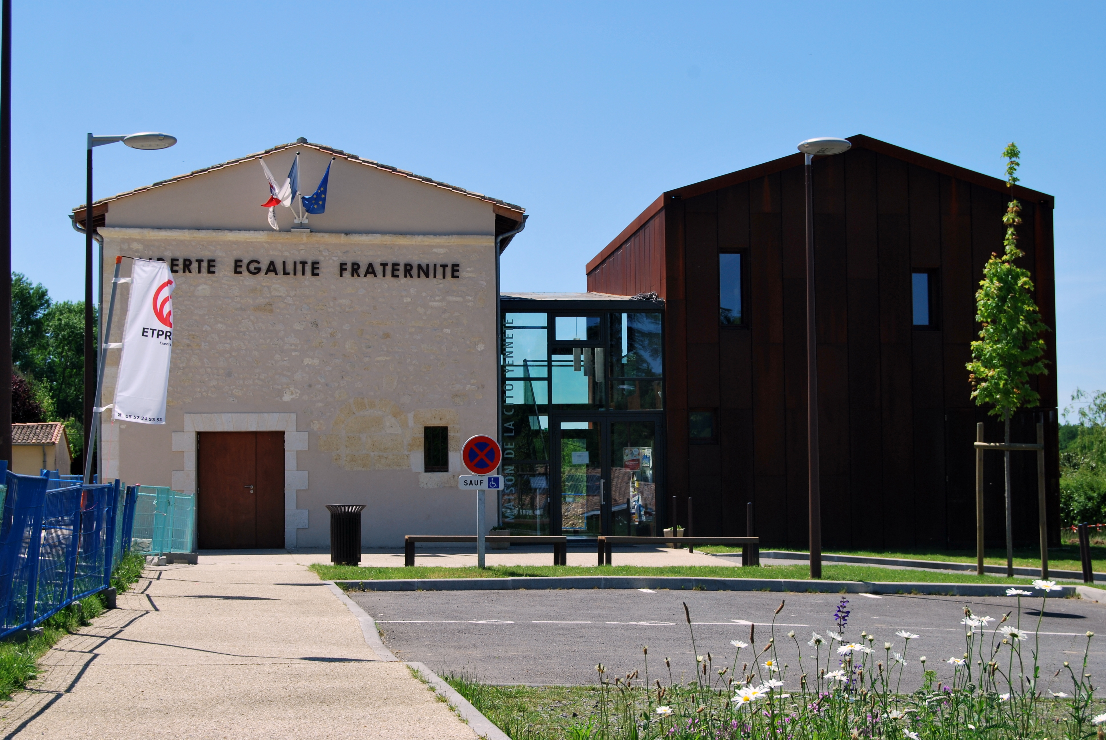 Mairie Croignon